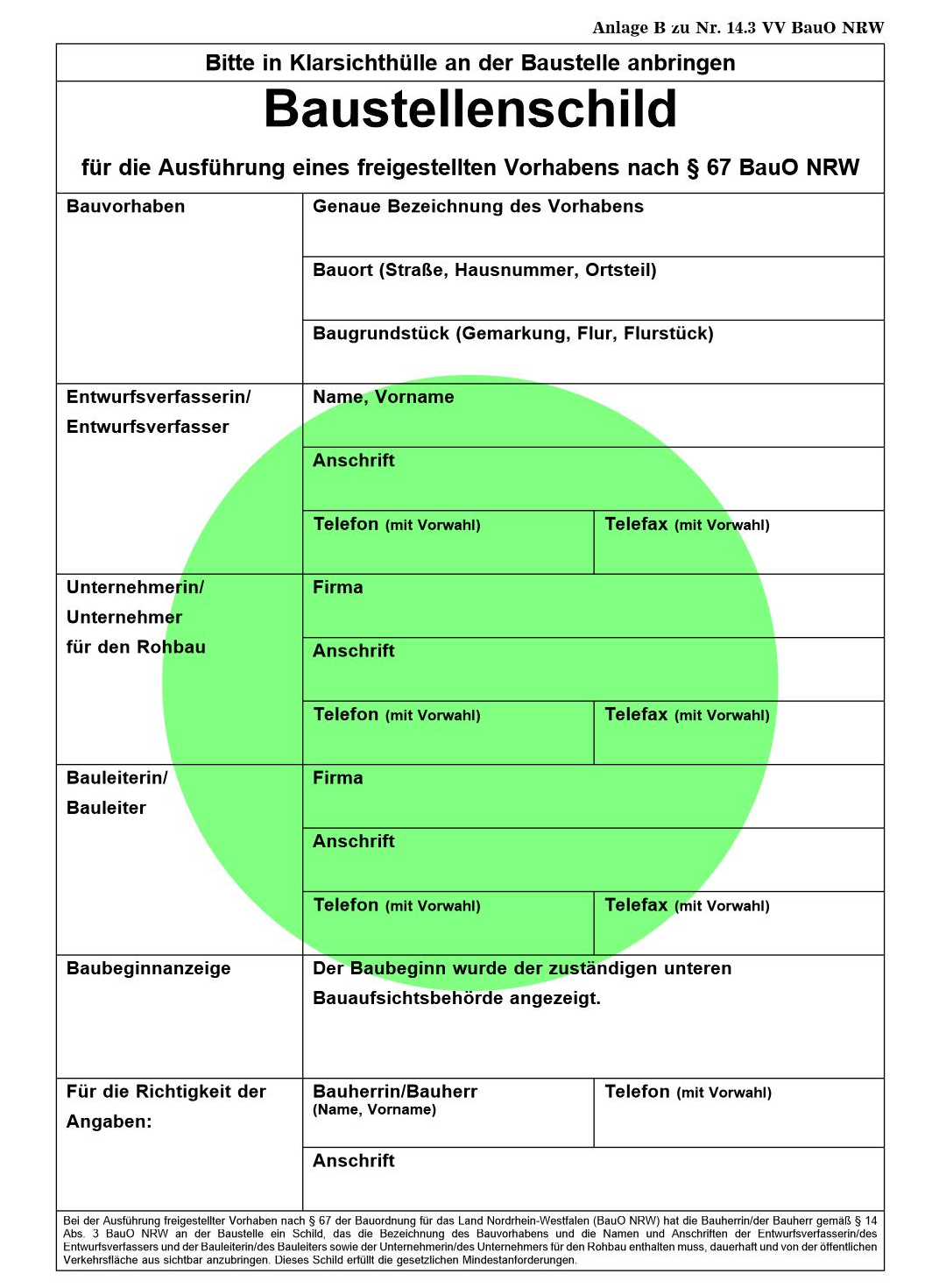 Baustellenschild (grün) für das Land NRW für nicht genehmigungspflichtige Bauarbeiten